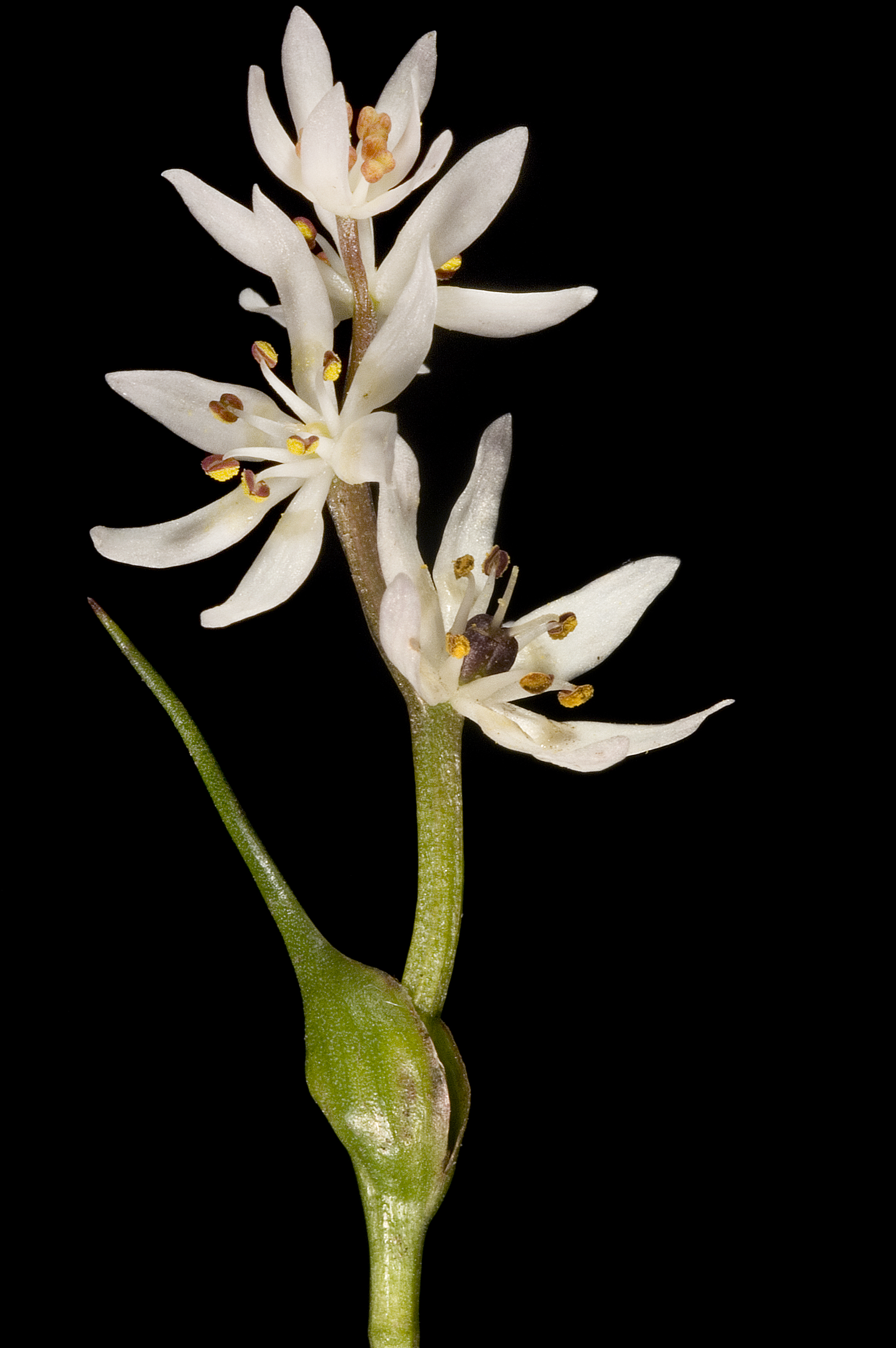 KRT3758